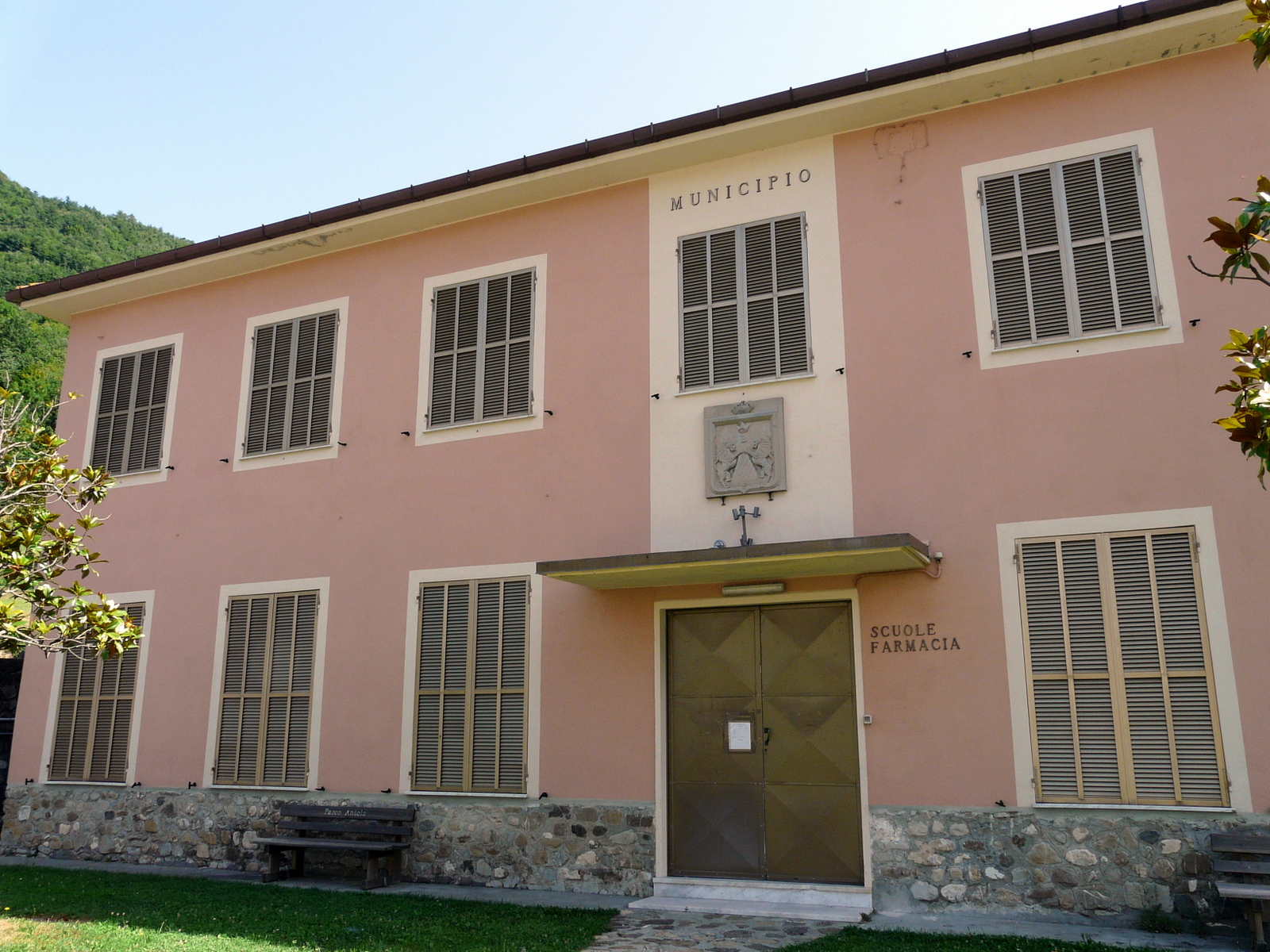 Il municipio di Montebruno, Liguria, Italia